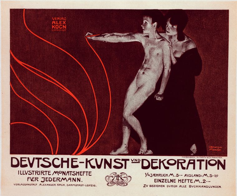 Affiche allemande pour la revue illustrée mensuelle "Deutsche-Kunst und Dekoration".